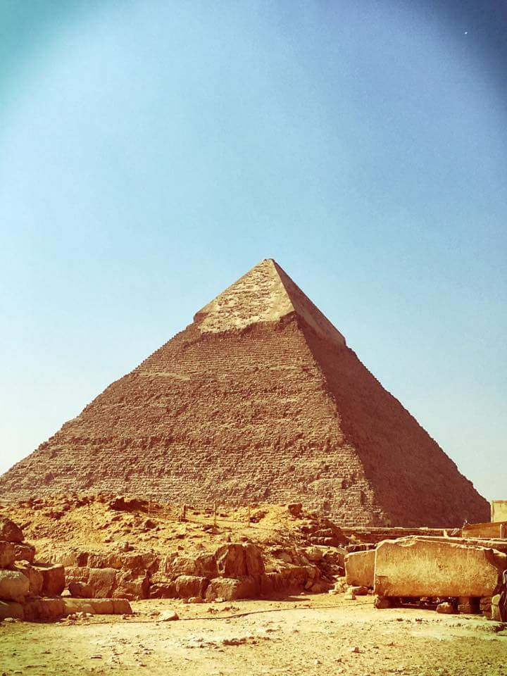 صورة لاهرمات الجيزة